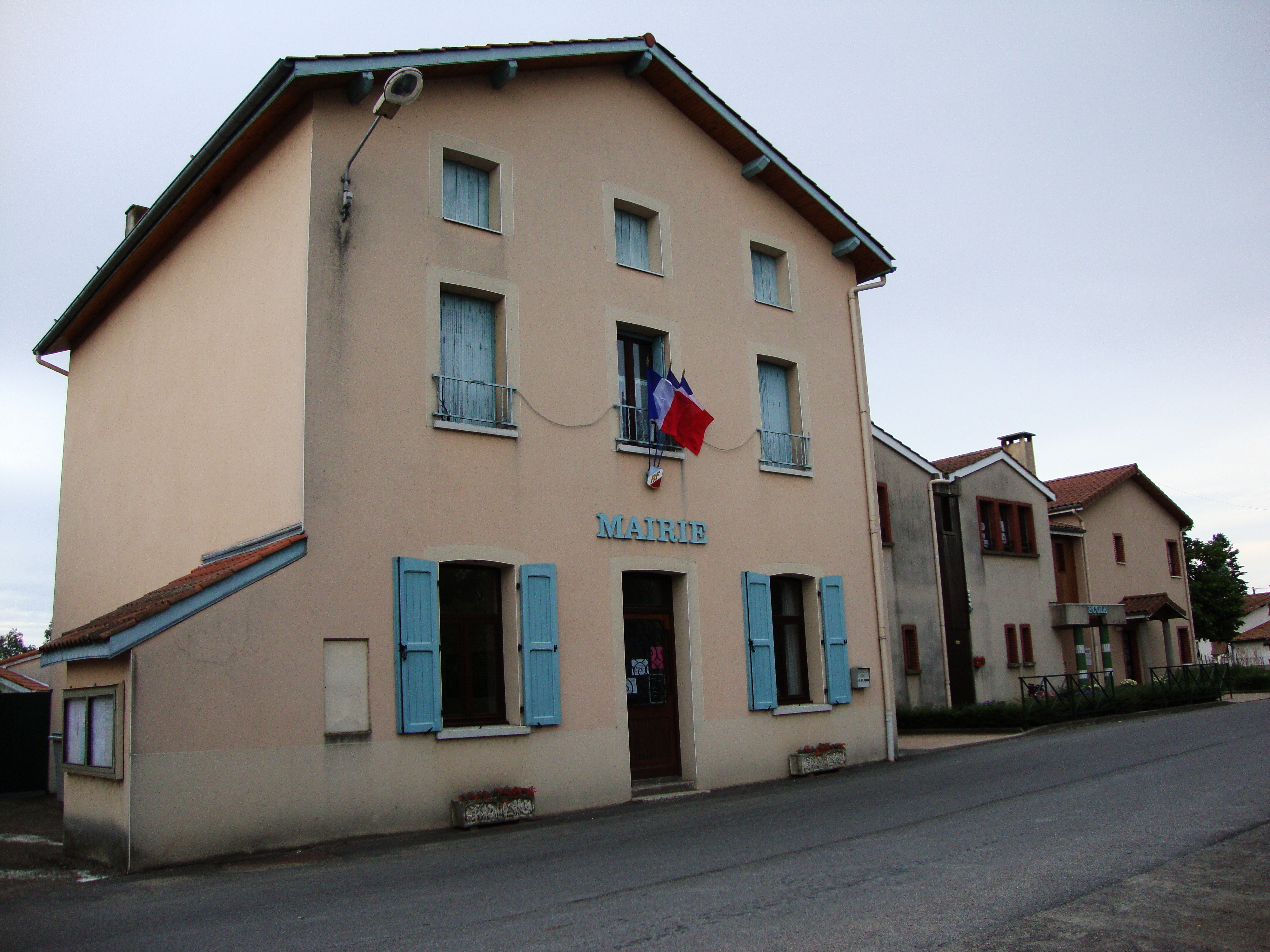 Marclopt (Loire, Fr) mairie avec école